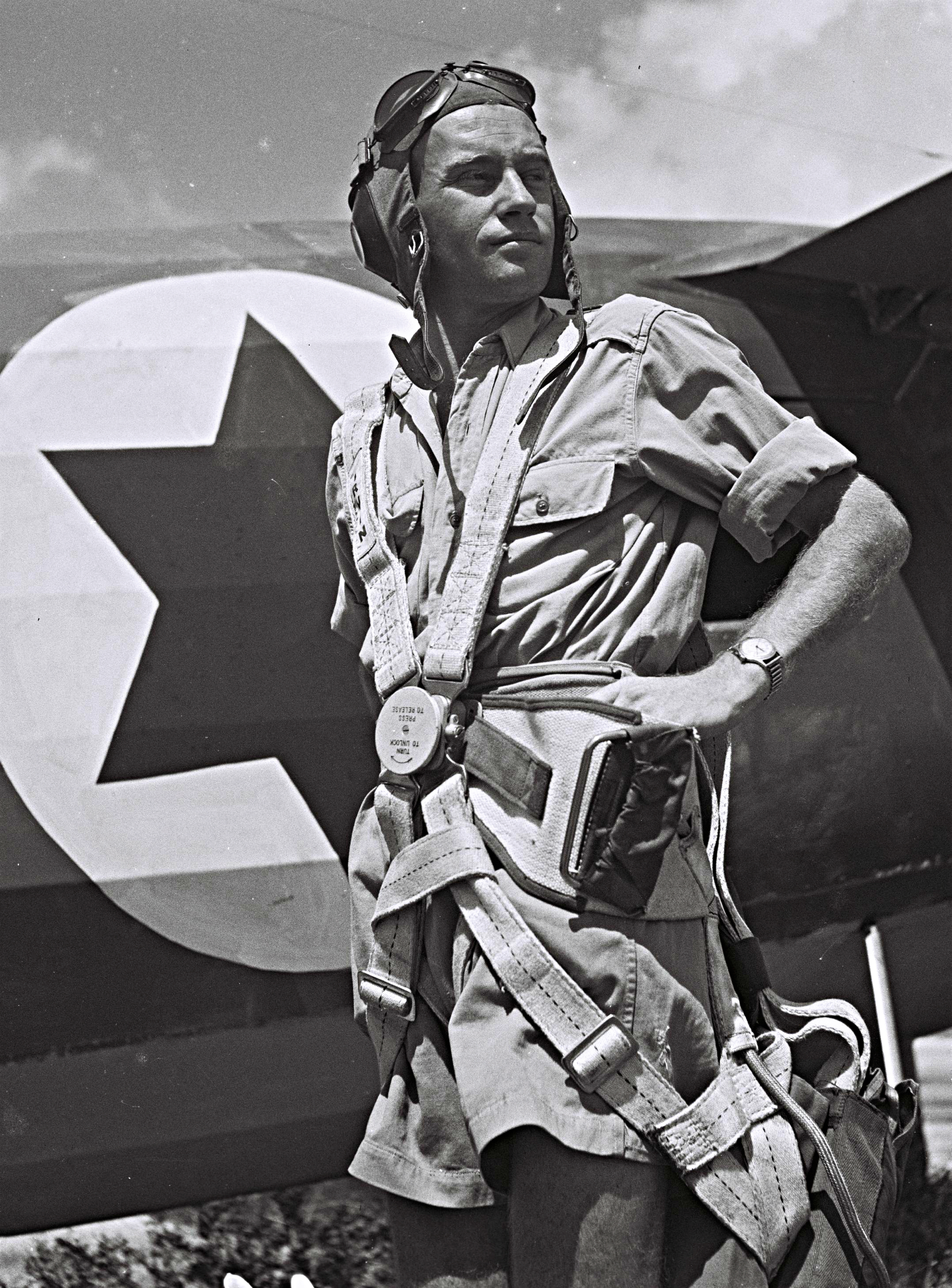 Israeli air force pilot